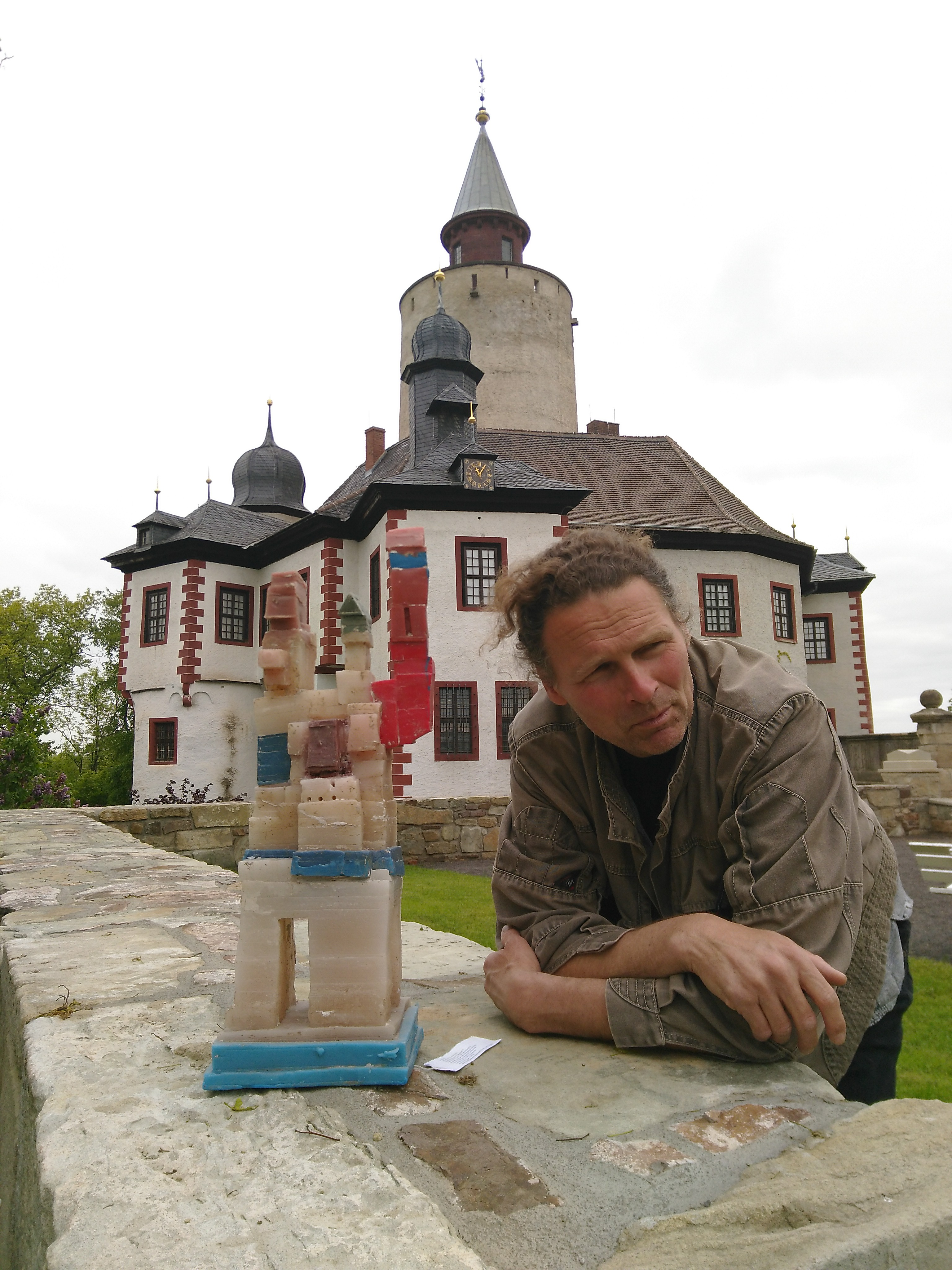 Für die Ausstellung "Zum Wesen des Staubes - Staubexpeditionen auf Burg Posterstein" kartierte Wolfgang Stöcker die Mikroebene der thüringischen Burg Posterstein. Das Bild zeigt den Künstler mit einem der aus Postersteiner Staub und Wachs entstandenen "Staubtürme".